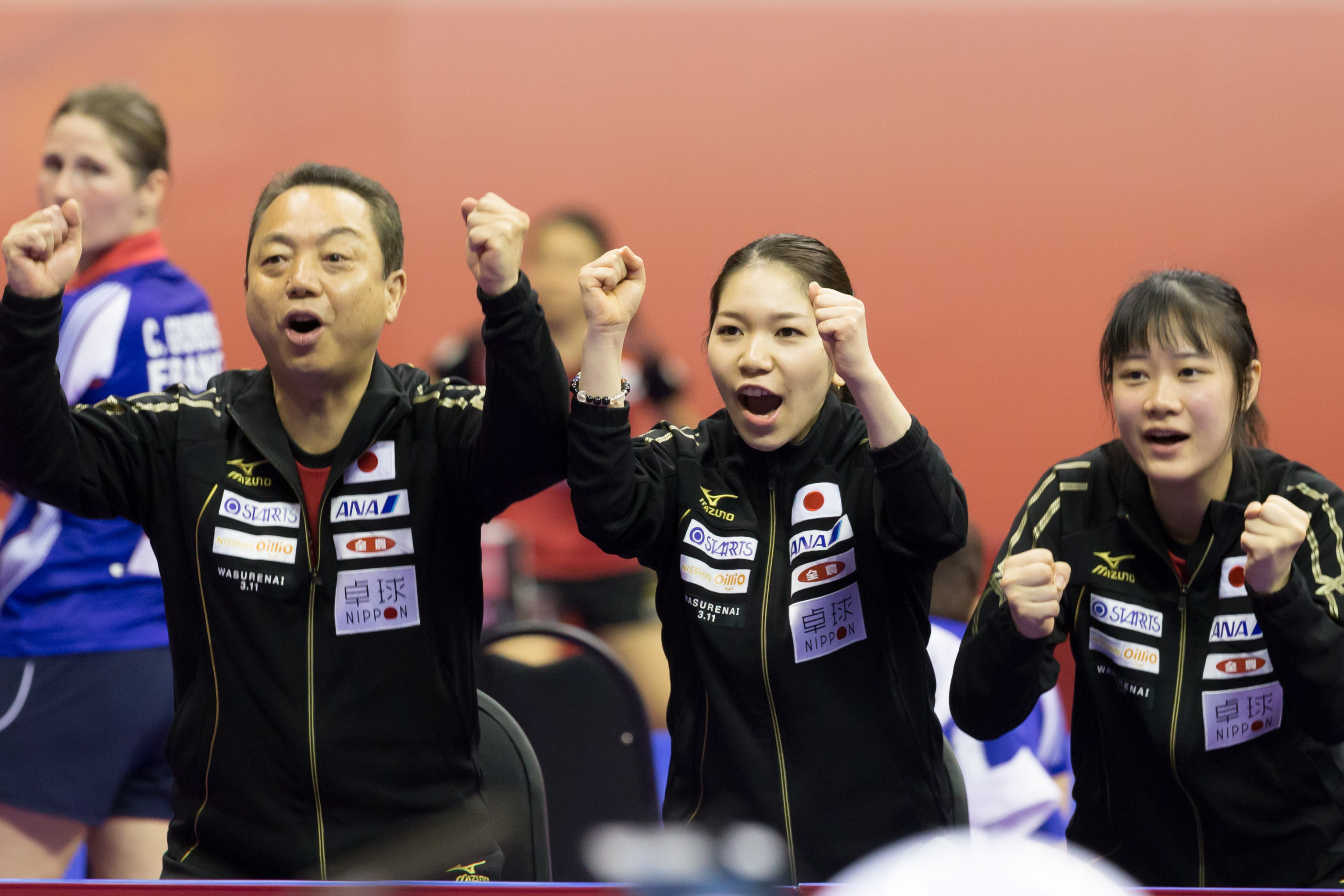 _K0K9093